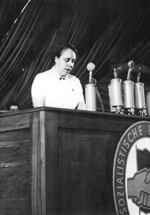 III.Parteitag der SED vom 20.-24.7.1950. Vom 20.-22.7.1950 findet in Berlin in der Werner-Seelenbinderhalle der III.Parteitag der Sozialistischen Einheitspartei Deutschlands statt. Am Sonntag (23.7.1950) überbrachte eine Bauerndelegation dem Parteitag der Sozialistischen Einheitspartei Deutschlands statt. Letzter Tag des Parteitages der SED-24.7.1950- UBz: Herta Kuusinen, Mitglied des Polit-Büros der KP Finnl. Aufn.: Illus-Quaschinsky 137 Gr 7294-50 24.7.1950